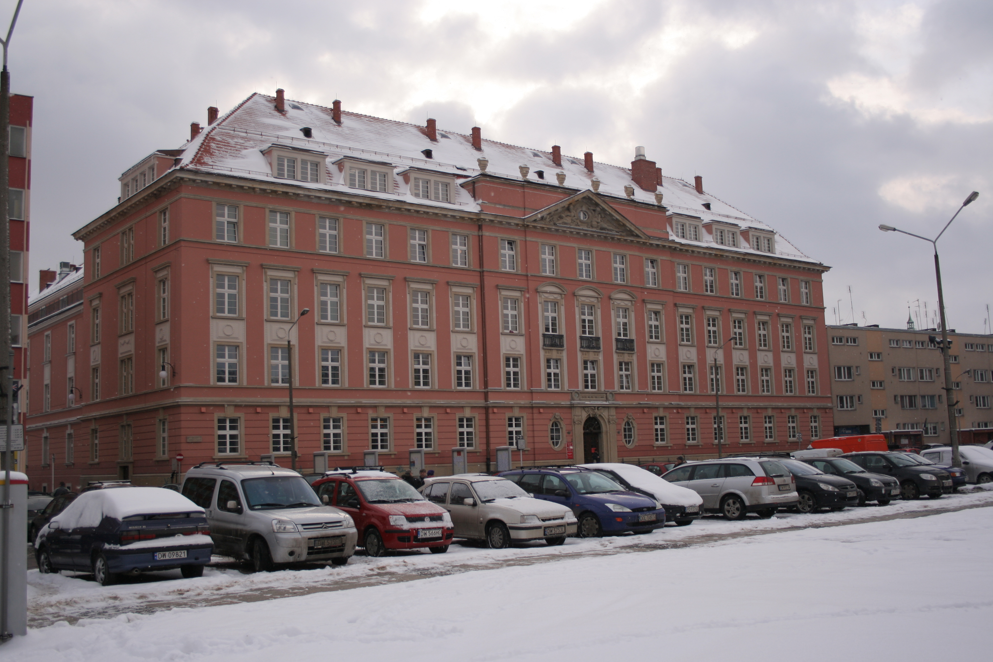 Budynek urzędu miejskiego na Nowym Targu